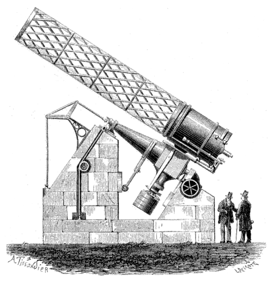 Le télescope de Melbourne pour La Nature, revue des sciences, n° 18, page 280.